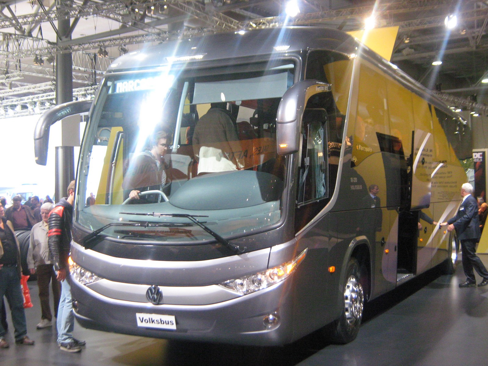 Internationale Automobilausstellung für Nutzfahrzeuge in Hannover 2010